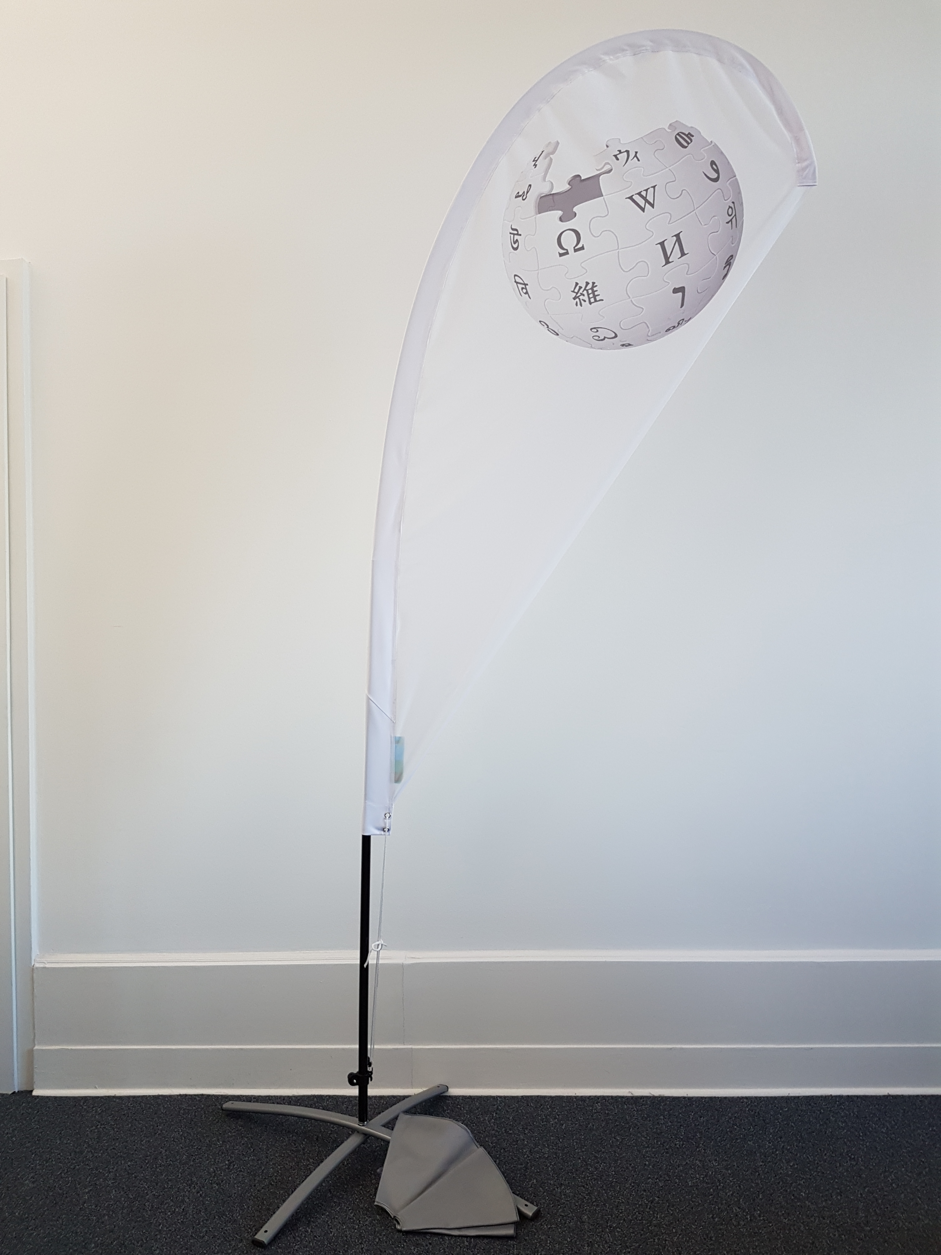 Beachflag mit Wikipedia-Logo, auszuleihen über den Technikpool